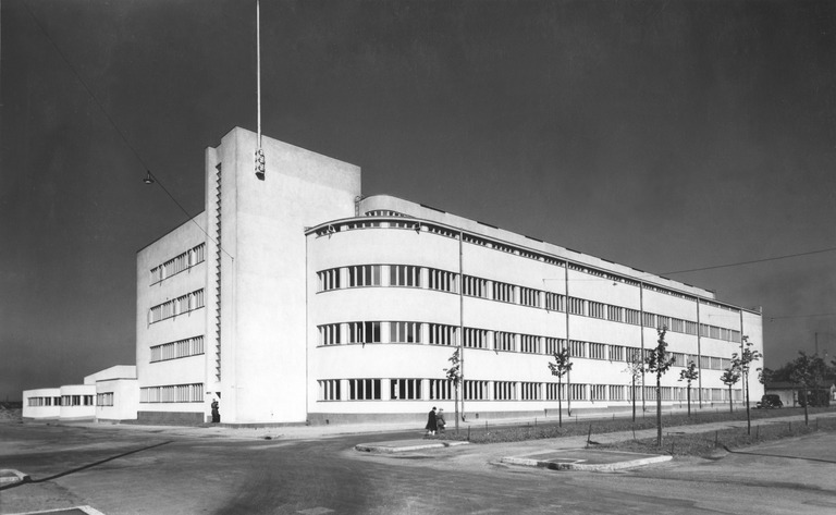 1937. Autokomppania. Mechelininkatu 32 - Pohjoinen Hesperiankatu 35, Helsinki.